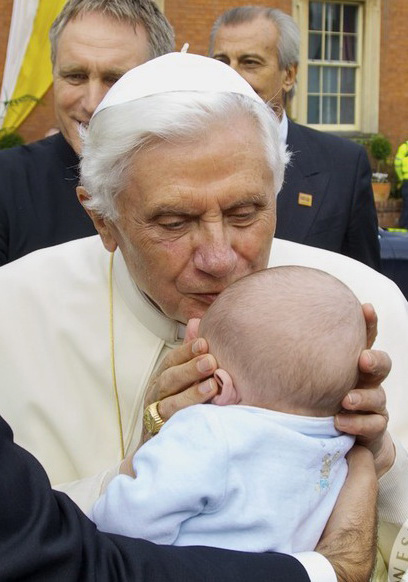 Visite du pape Benoît XVI à Birmingham, Royaume-Uni. Sur la photo, il est embrasser un bébé.